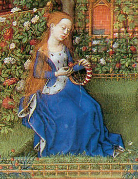 Giovanni Boccaccio: Emilia in the rosegarden (Teseida) (detail).